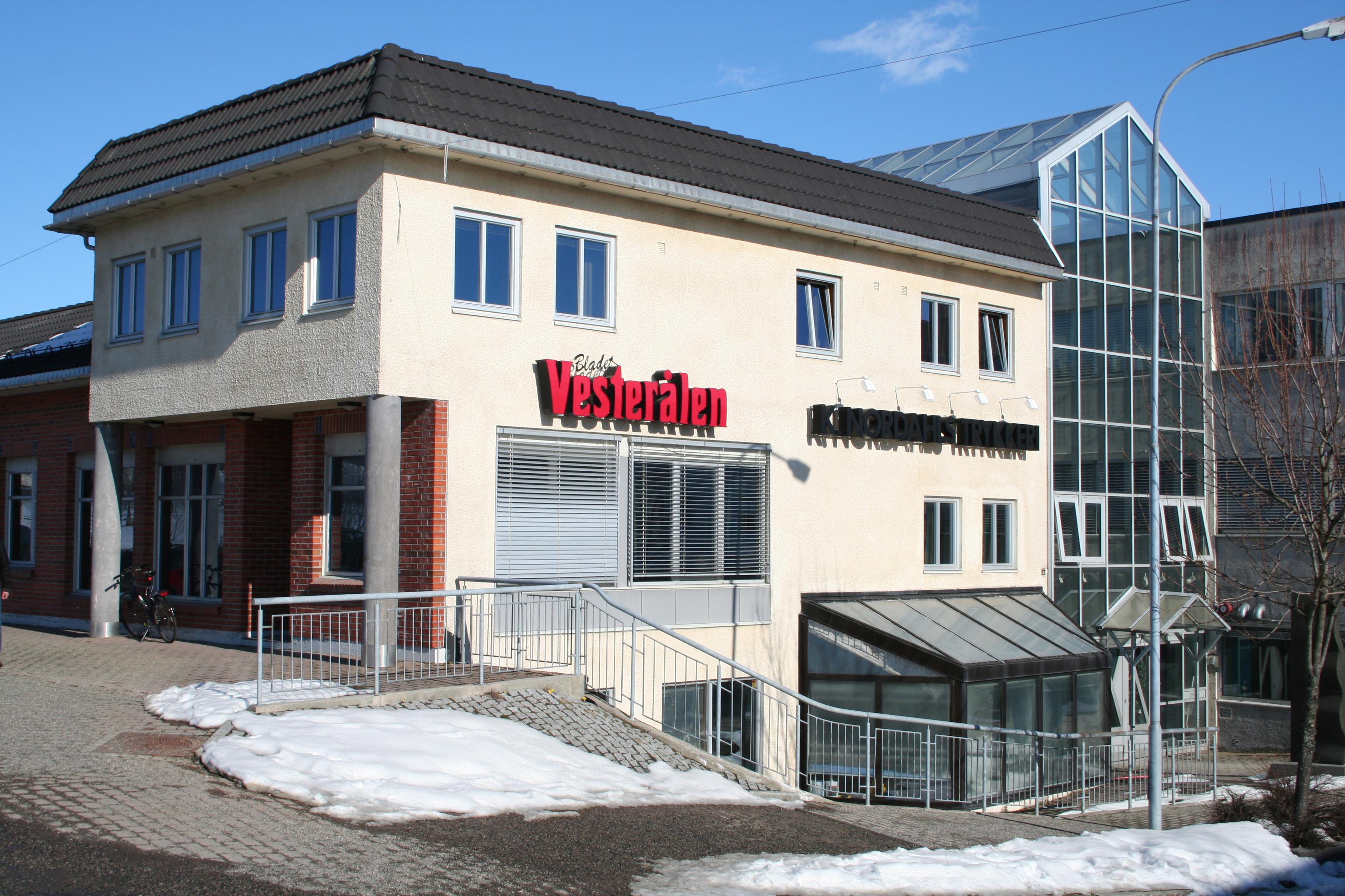 Bladet Vesterålen og K. Nordahls Trykkeri, avishuset på Sortland